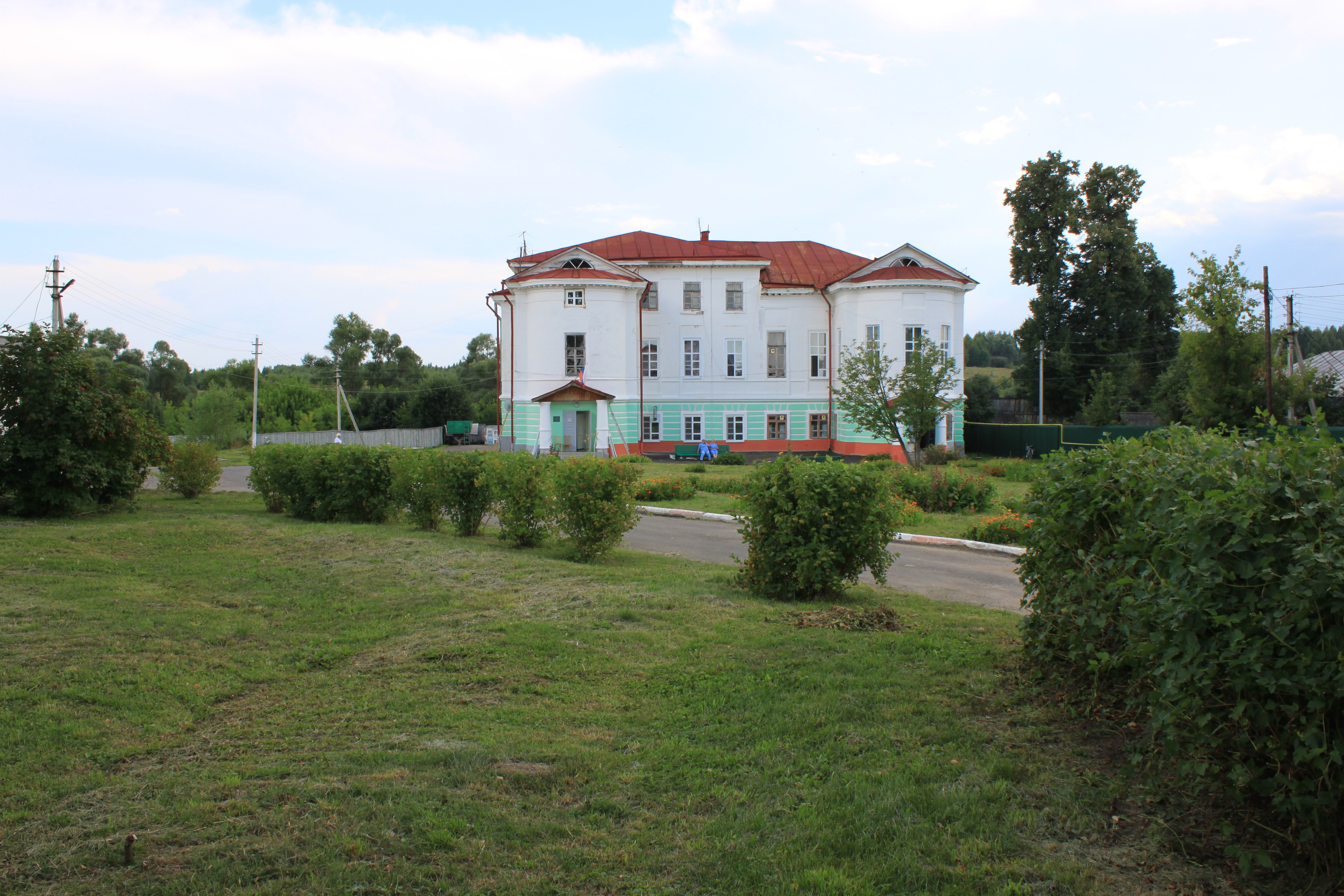 Un amour qui m'a ... envahi